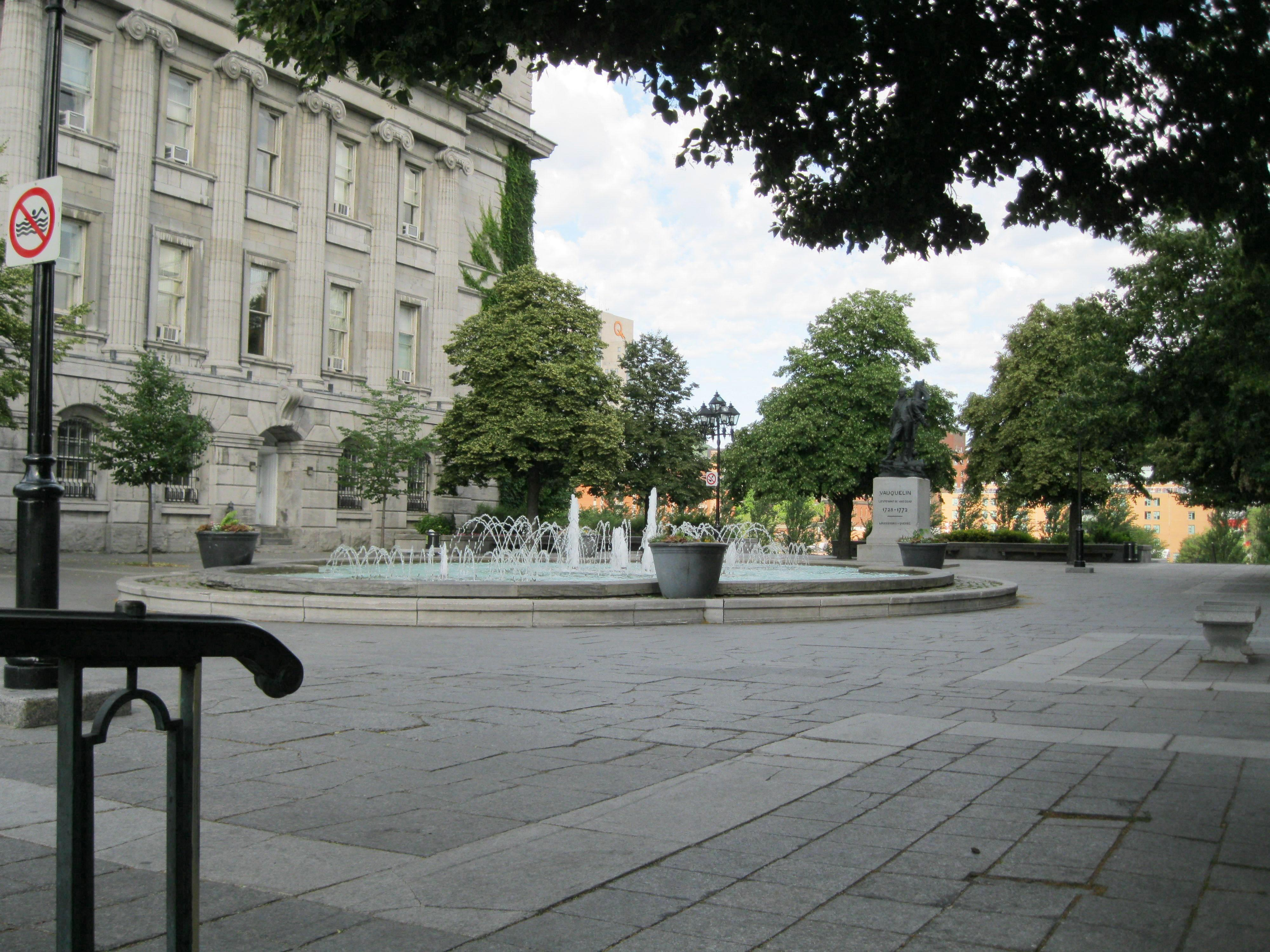 Fontaine de la place Vauquelin, Montréal